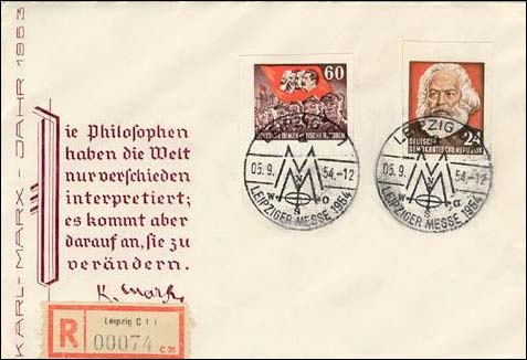 Конверт ГДР, посвящённый Марксу